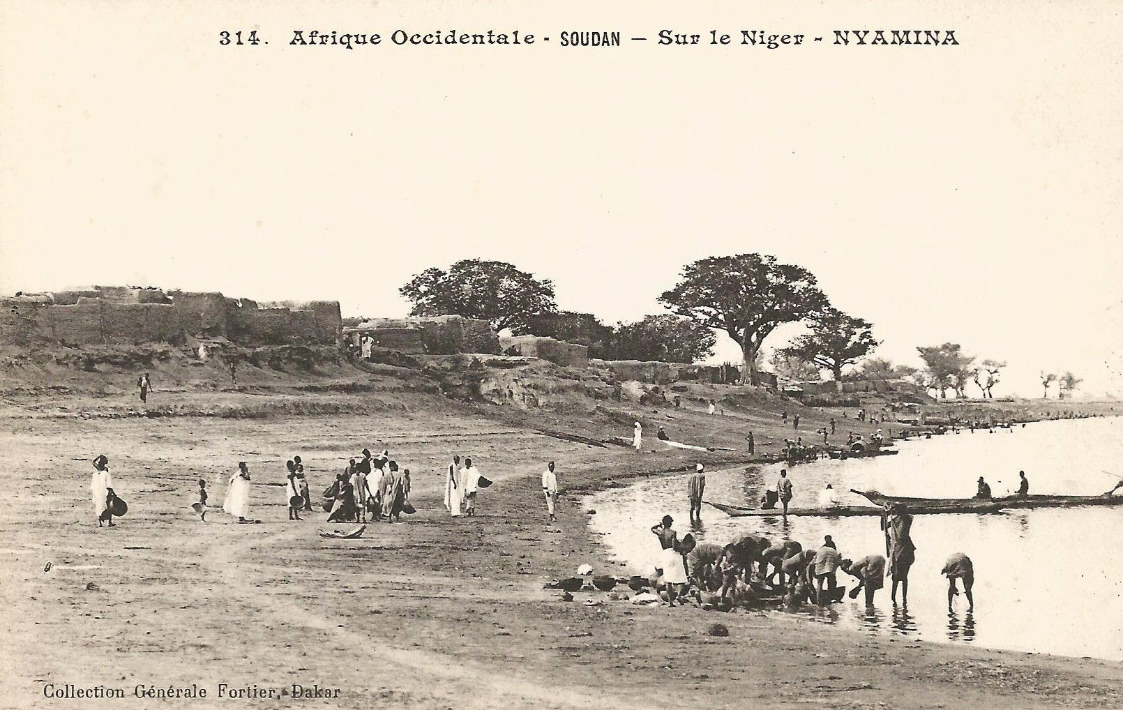 François-Edmond Fortier, Nyamina sur le Niger. Afrique Occidentale - Soudan.